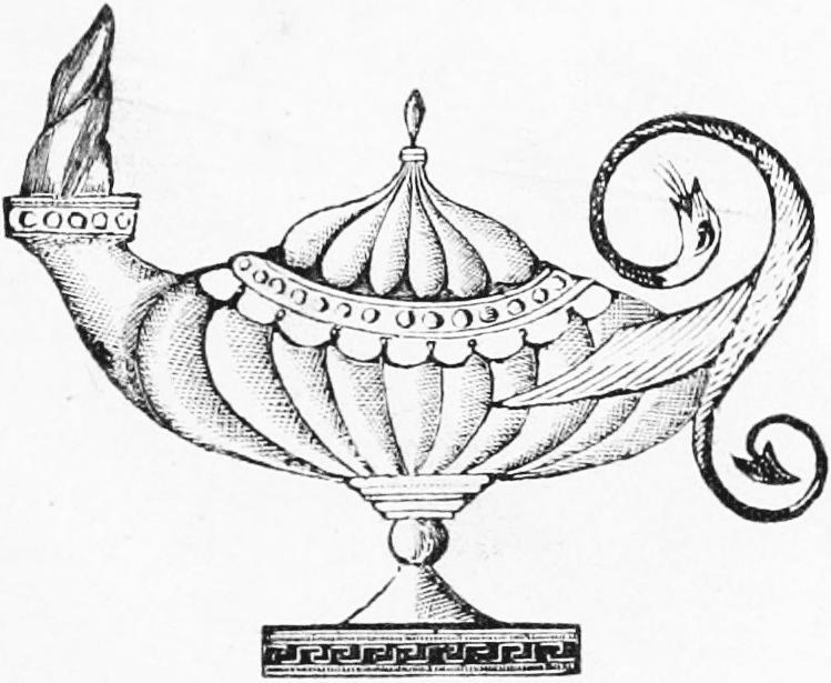 Logo der Griechischen Philologischen Gesellschaft in Konstantinopel (1861–1922)